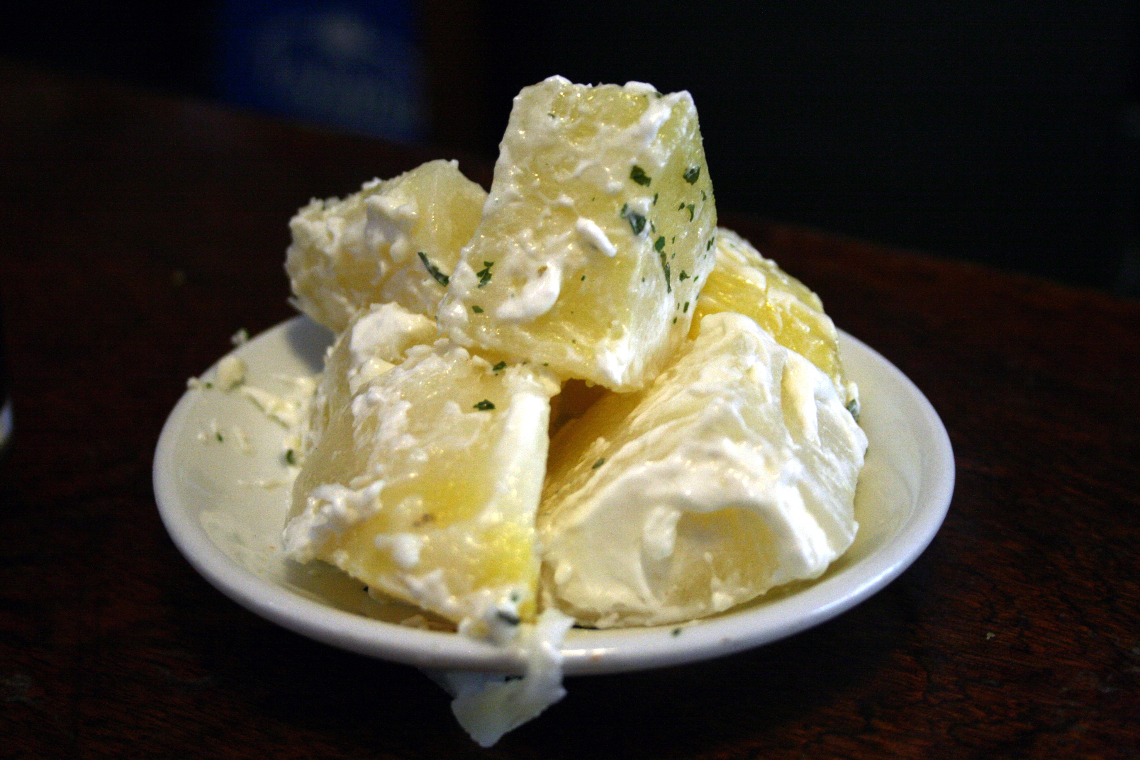 Patatas Ali-Oli